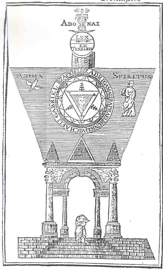 gravure tirée du livre LES PLUS SECRETS MYSTERES DES HAUTS GRADES de la Maçonnerie dévoilés, ou le vrai ROSE-CROIX, traduit de l’anglois, suivi du NOACHITE, traduit de l’allemand, à Jérusalem.